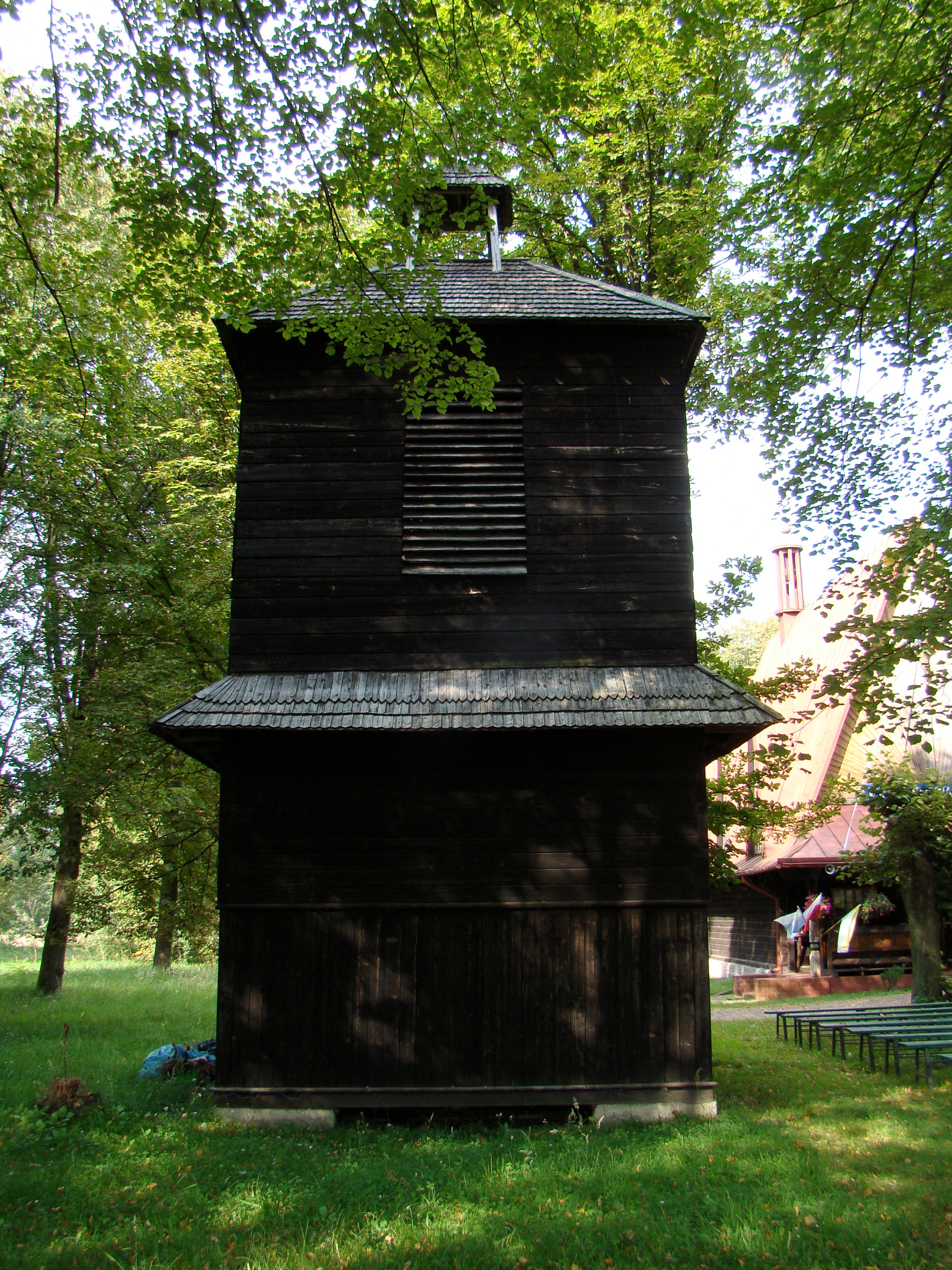 Dřevěná zvonice v obci Bondyrz, Polsko